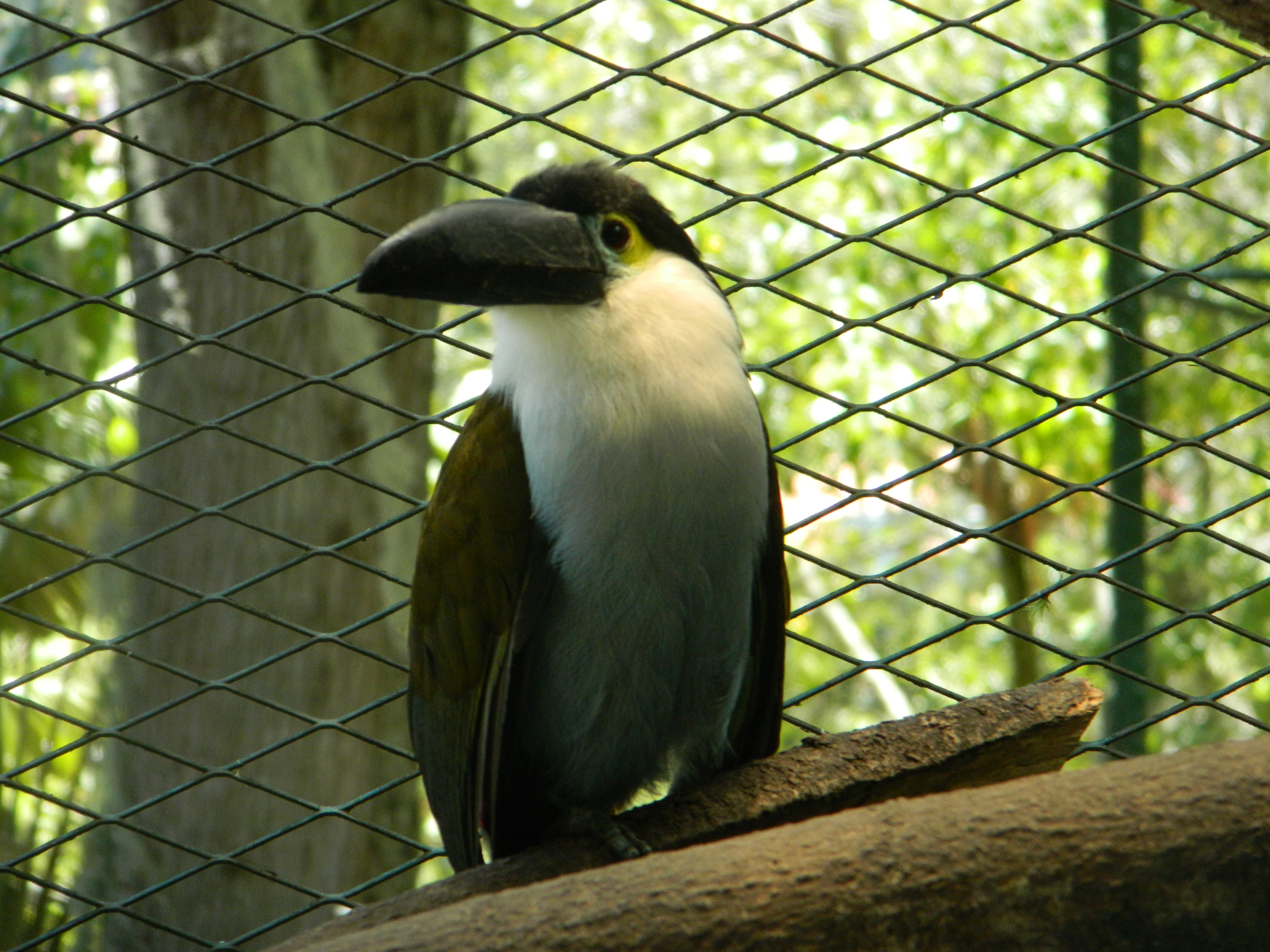 Recorrido por el parque Chorros de Milla Estado Mérida, Venezuela